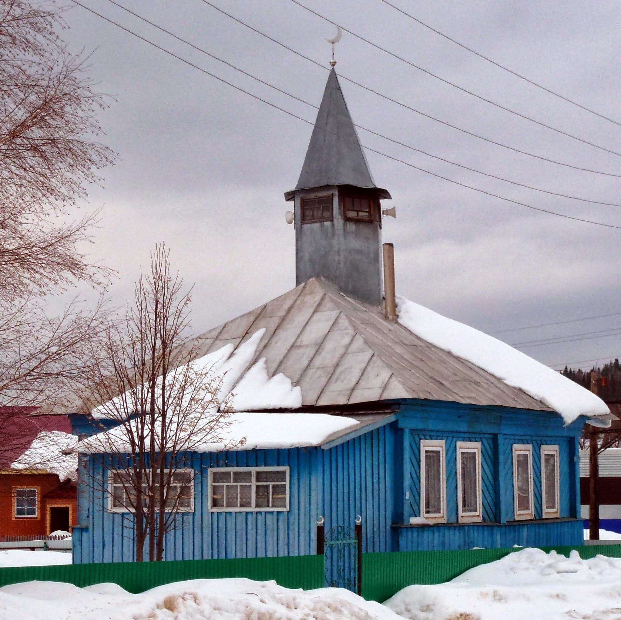 Мечеть, Березники, Пермский край